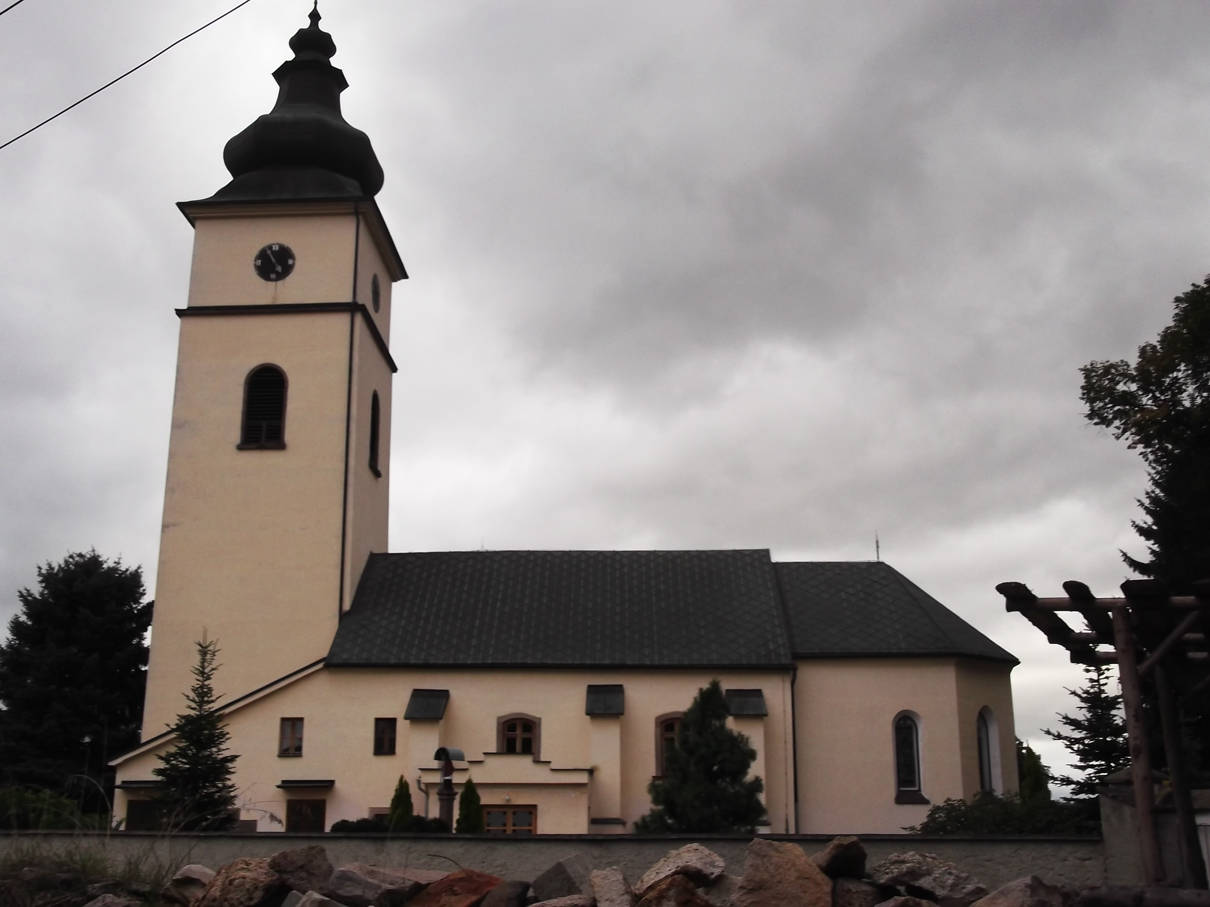 Kostol